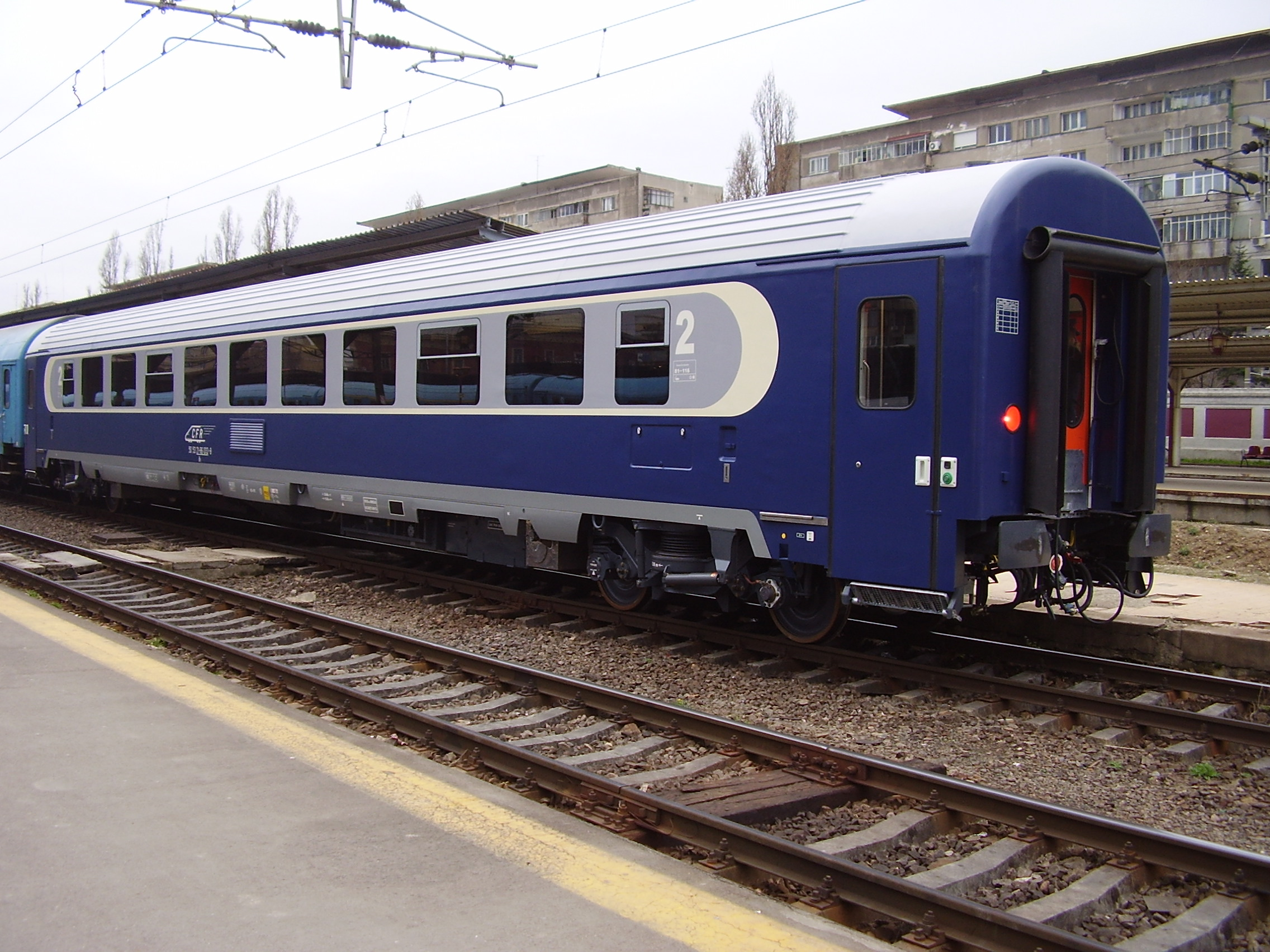 Vagon clasa 21-86, folosit pentru trenuri rapide şi interurbane.